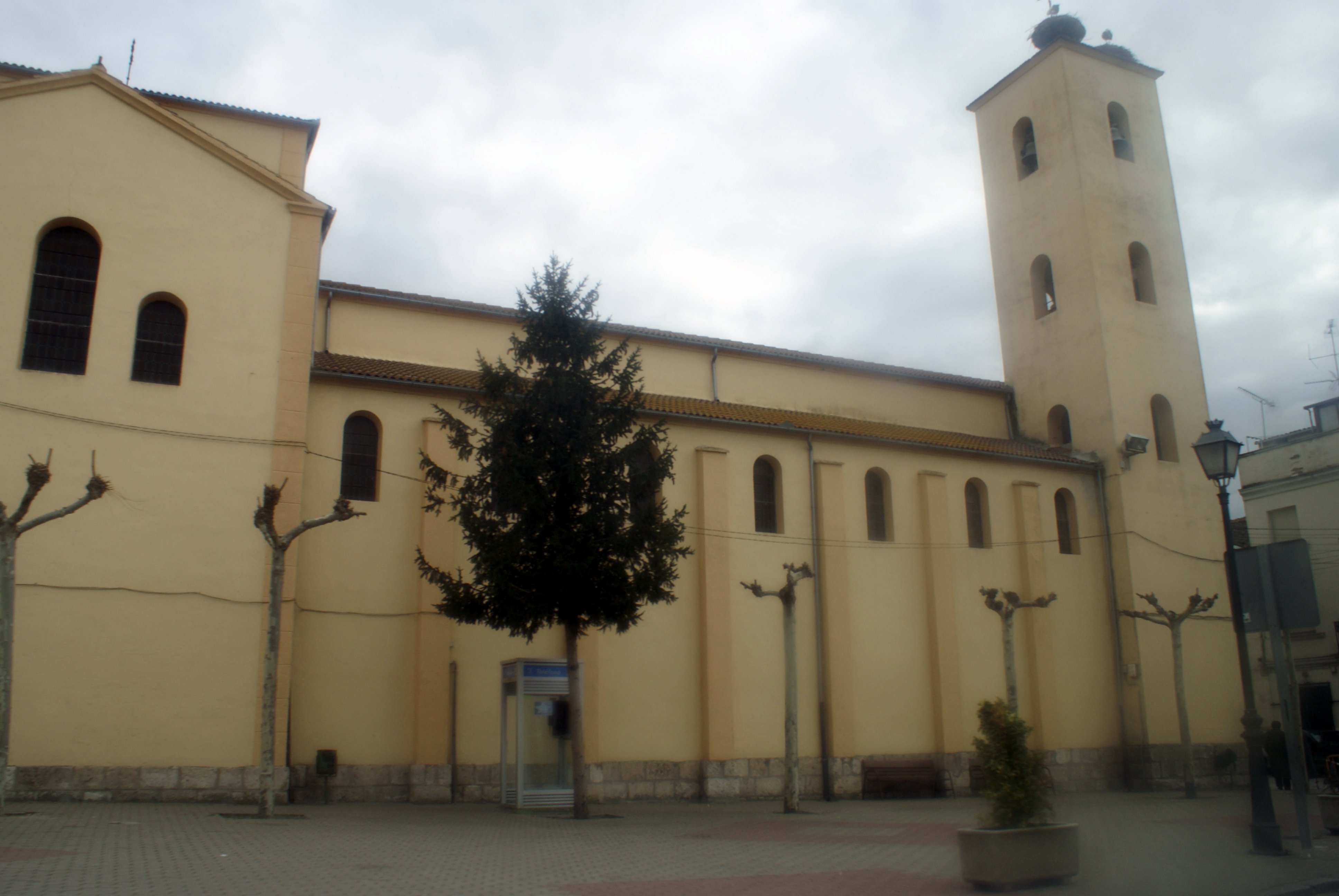 Iglesia de Santo Tomás de Vallelado (Segovia)